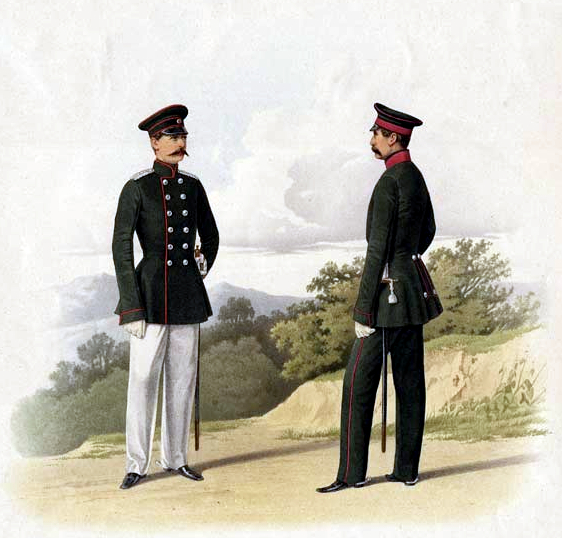 Медик и Аудитор числящиеся в Армейских войсках, 7 февраля 1859. (В вседневной форме).